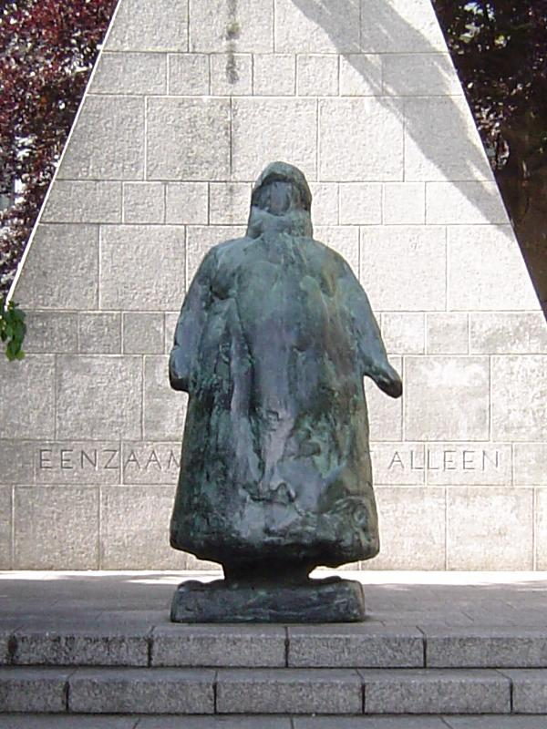 zoomed from Statue of Queen Wilhelmina, Noordeinde, Den Haag, Holland, made by Charlotte van Pallandt